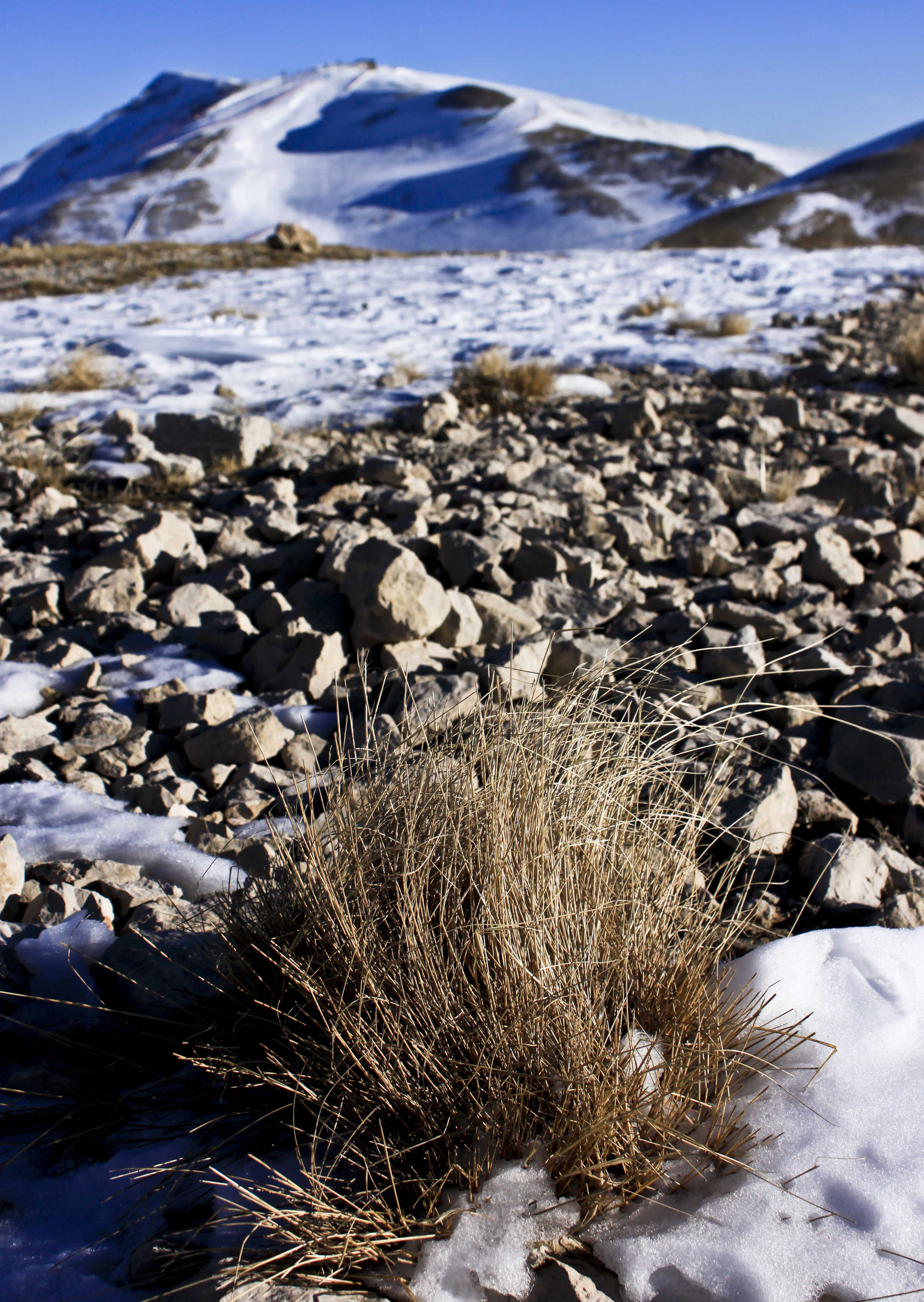 Fotografia di Gabriele Altimari